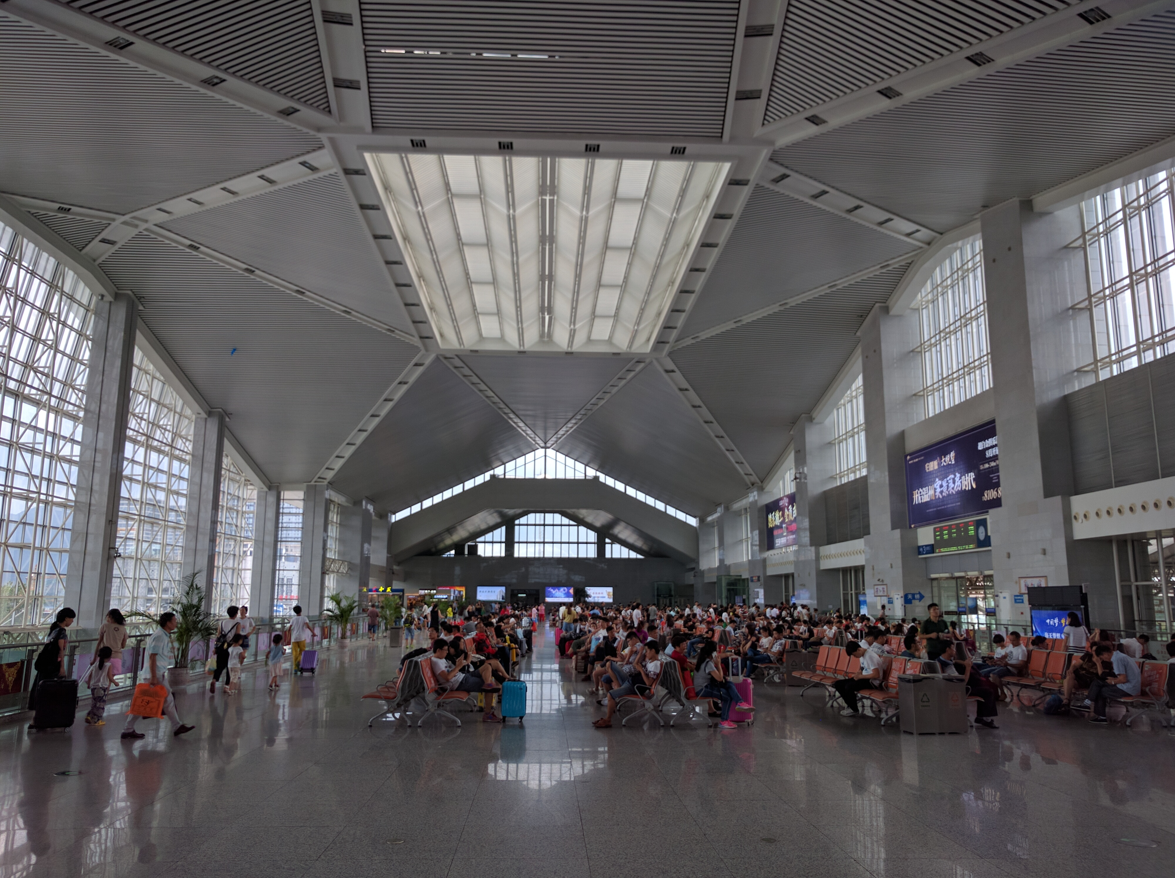 中文（中国大陆）: 温州南站二楼候车室